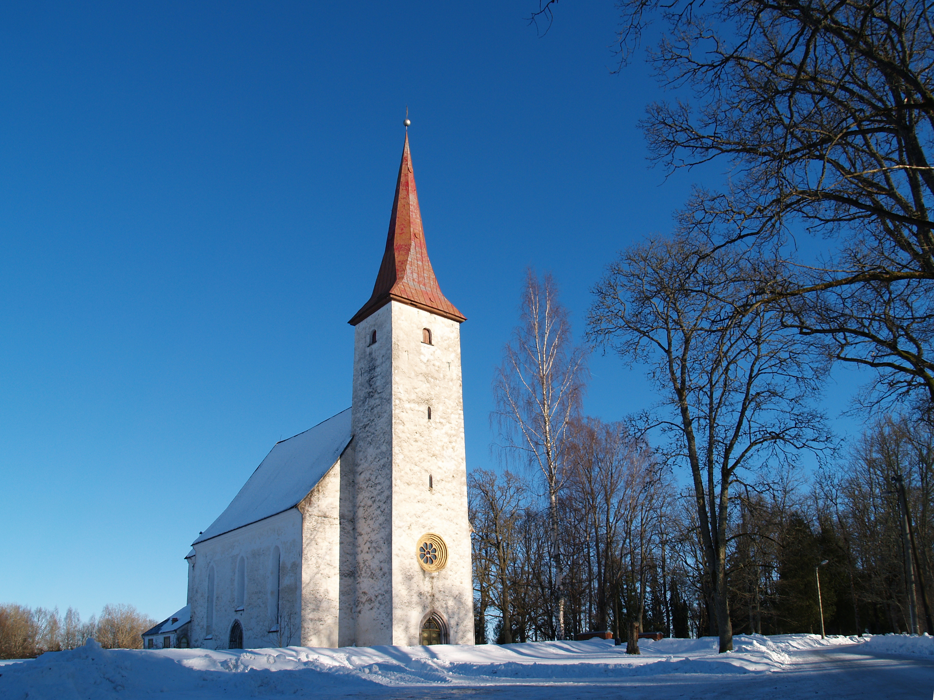 Suure-Jaani kirik talvel